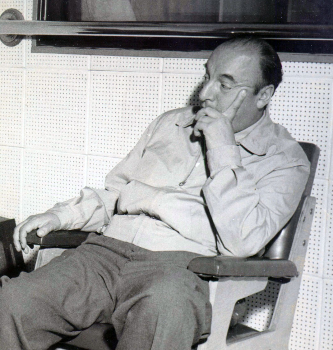 Pablo Neruda (1956)